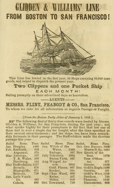 Advertisement